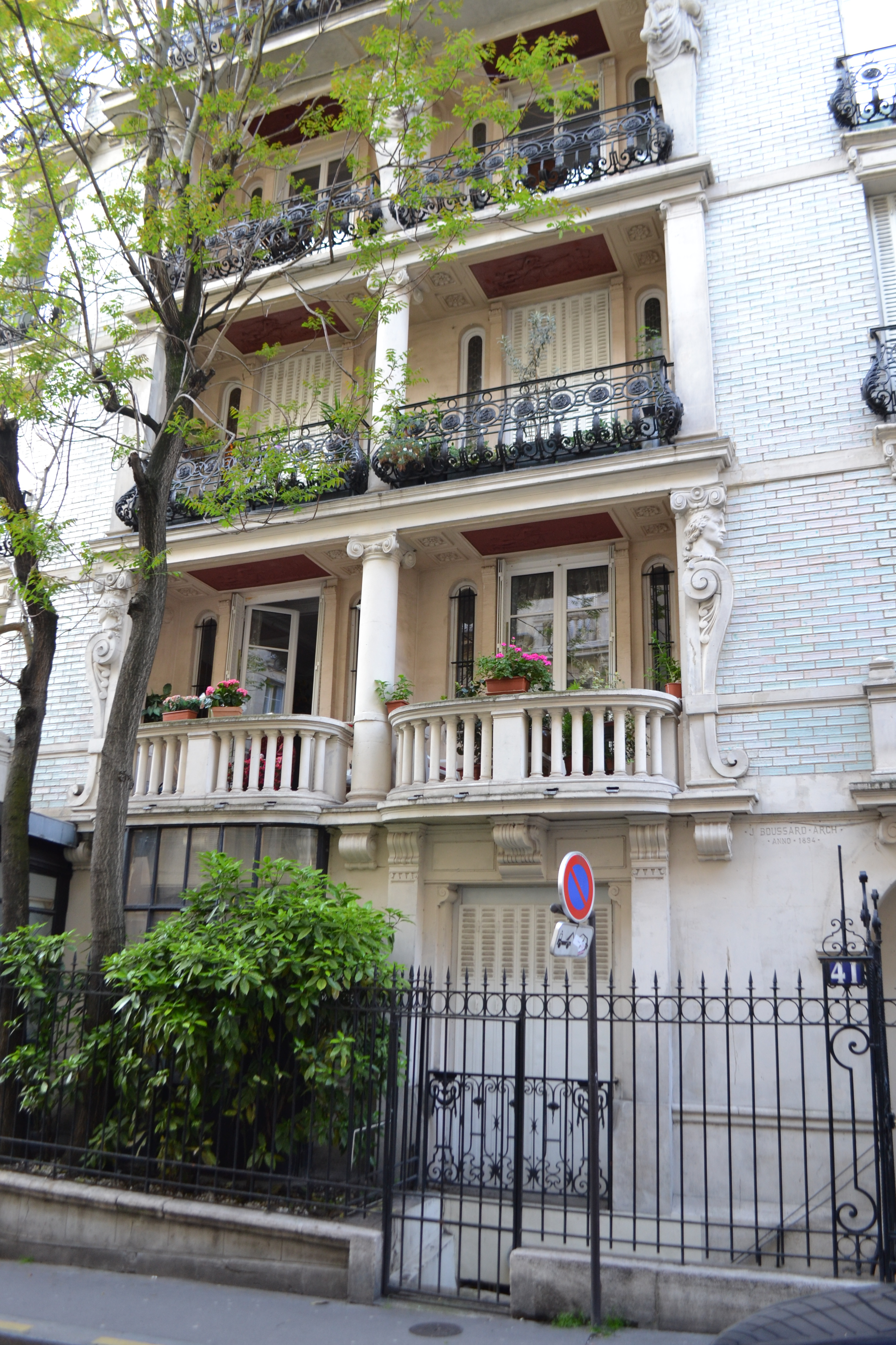 Immeuble du 41 de la rue Ribera, Paris 16e ; architecte : Jean-Marie Boussard (1894).